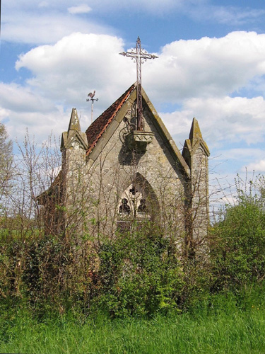 Chapelle SaintJacques